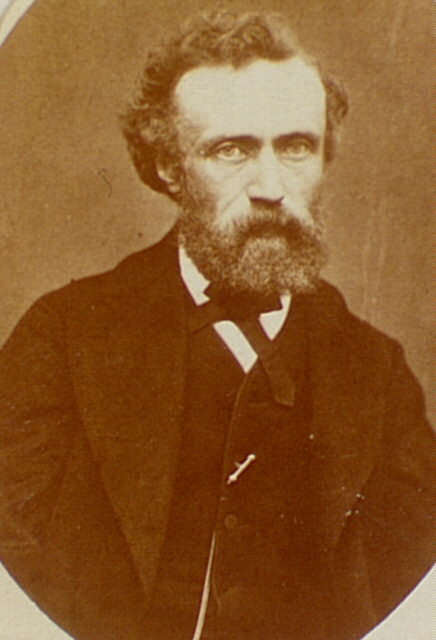 Ulysse Parent (1828-1880)